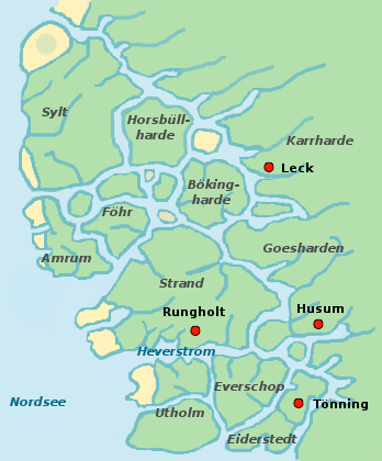 Die nordfriesischen Uthlande (Außenlande) -mit Rungholt- vor der Sturmflut 1362 (Große Manddrukning)